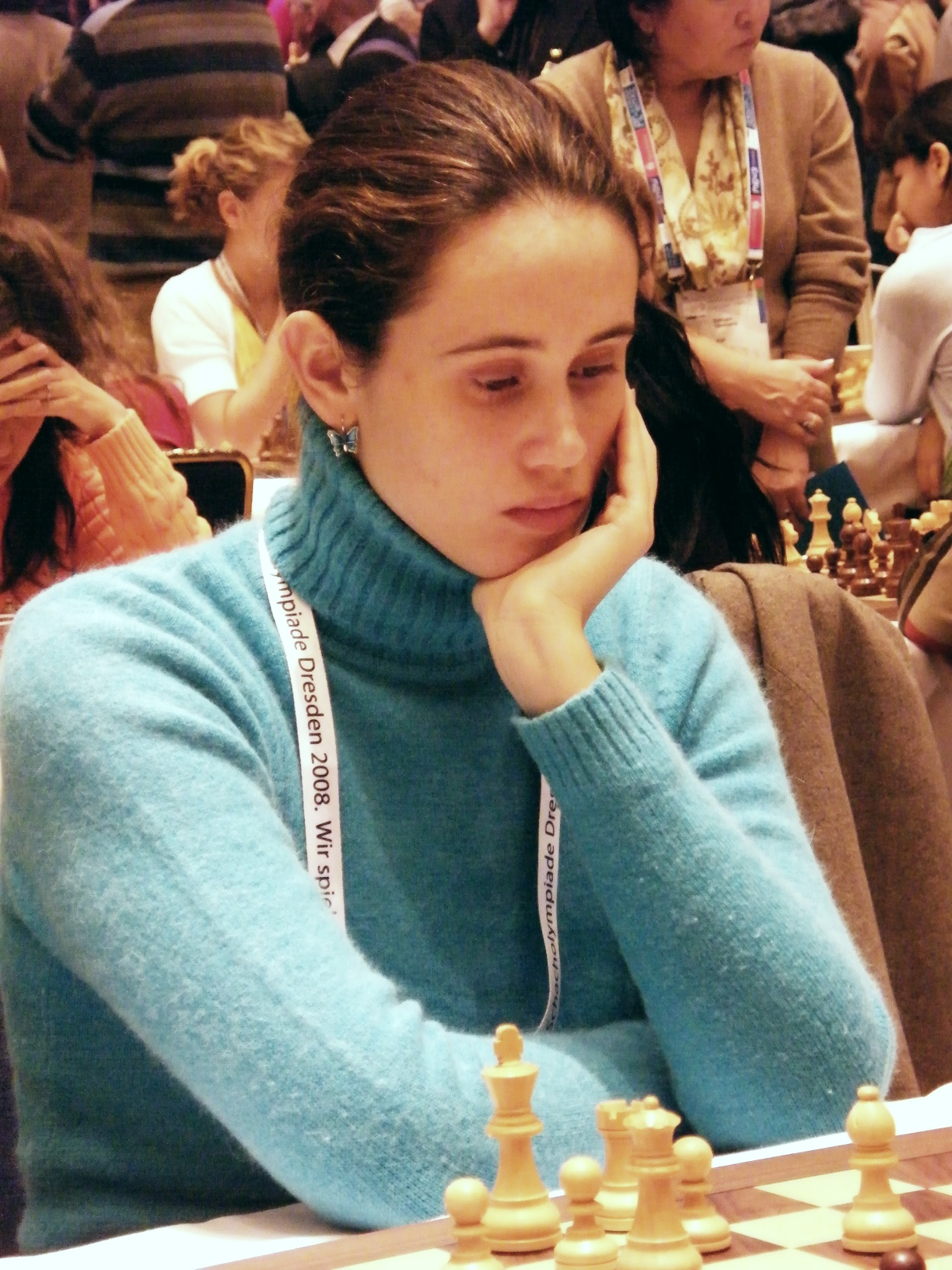 Margarida Coimbra bei der 38. Schacholympiade in Dresden 2008